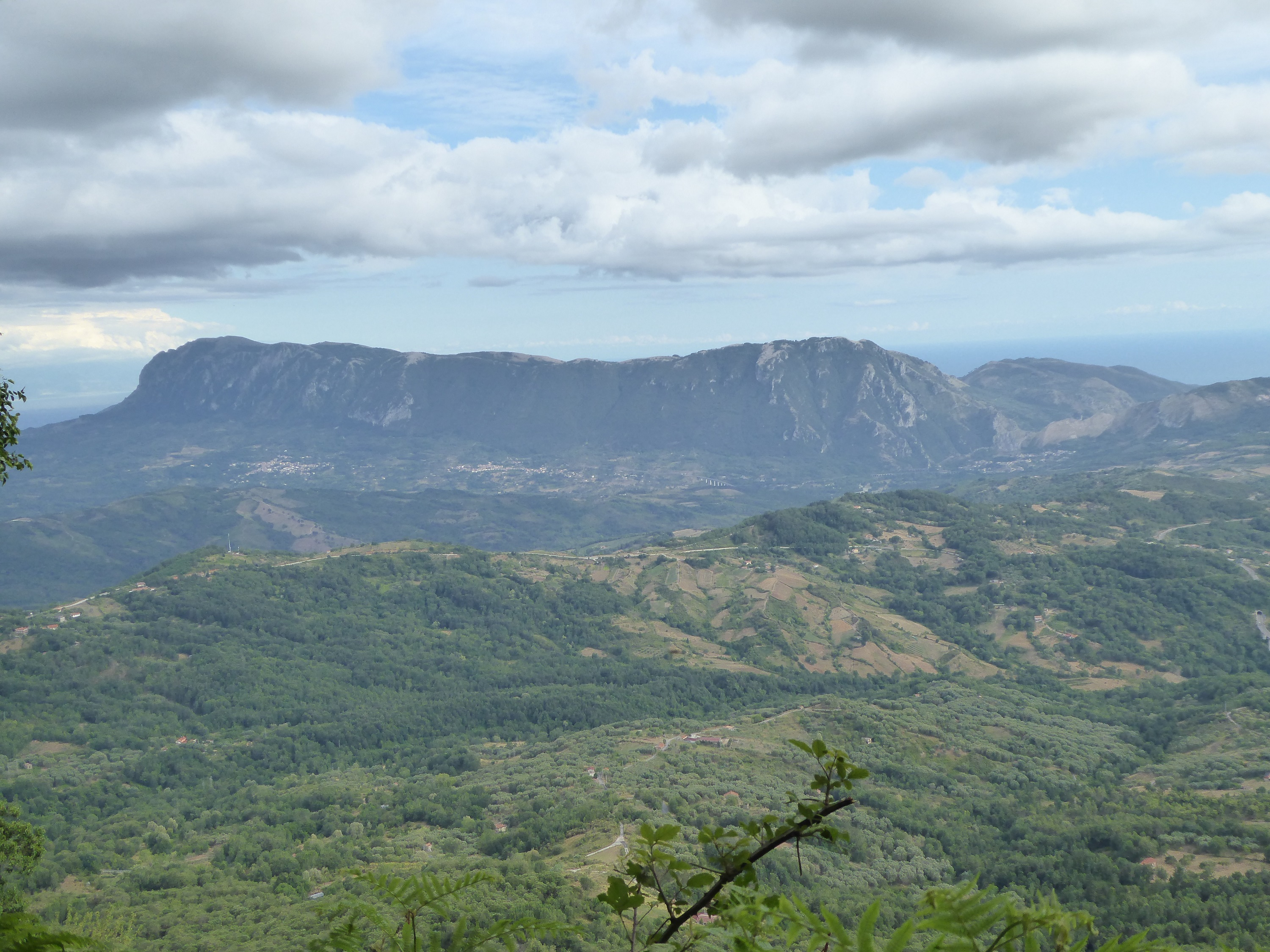 Monte Bulgheria visto dalla montagna loc. Cornia di Futani (SA). Panorama completo della leonessa dormiente.